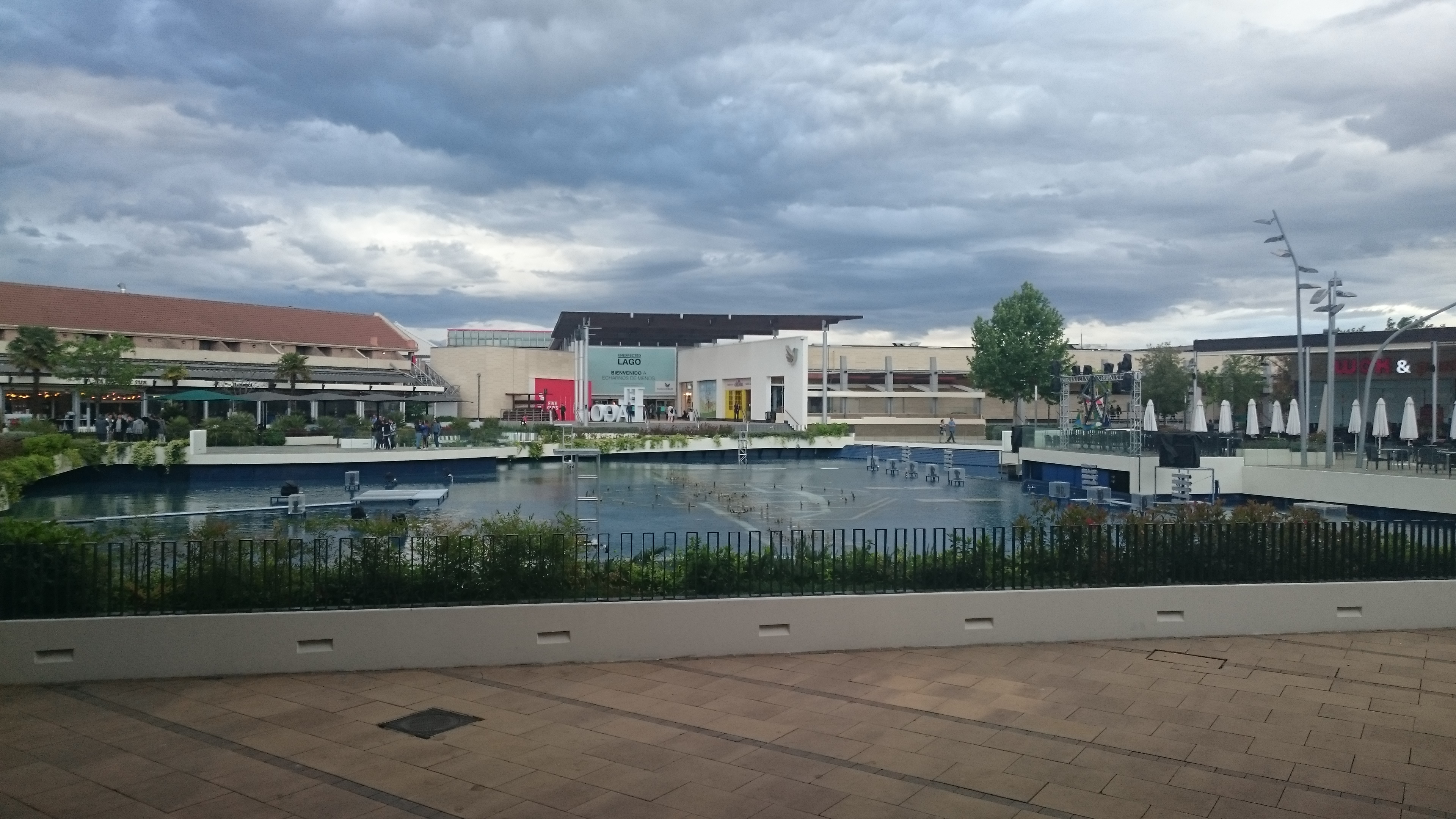 Lago y fuente cibernética del centro comercial Parquesur, en Leganés.